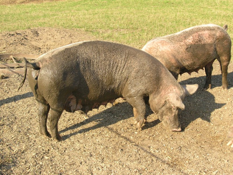 Schweinen sieht man die Form der Haltung nicht nur am Schlamm sondern auch am Ringelschwanz an URL: Ex :: Natura - Freies Portal für Umweltbildung